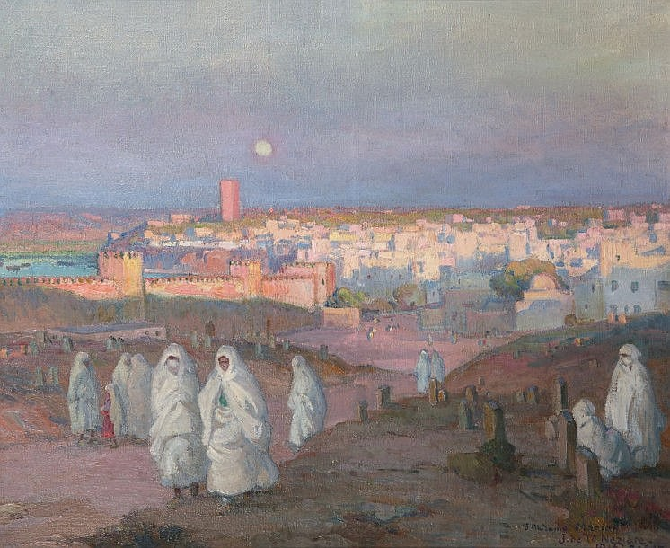 Peinture : Femmes en blanc aux abords de Rabat